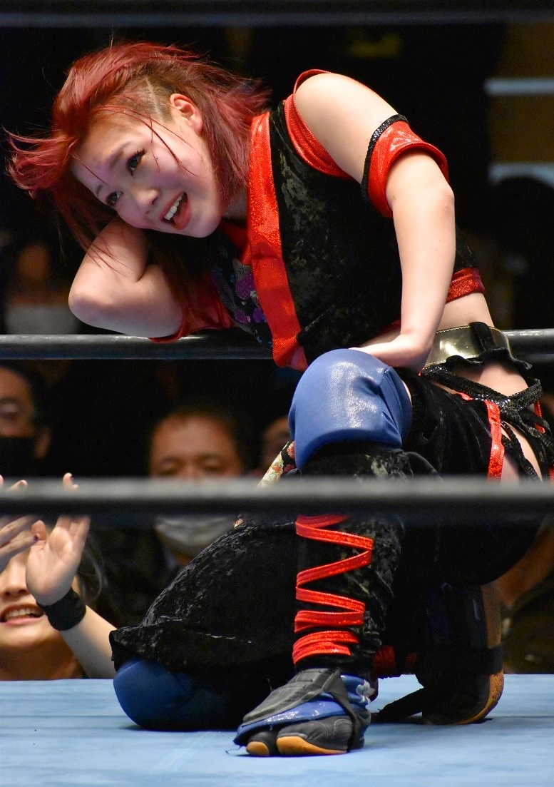 プロレスラーの鈴季すず